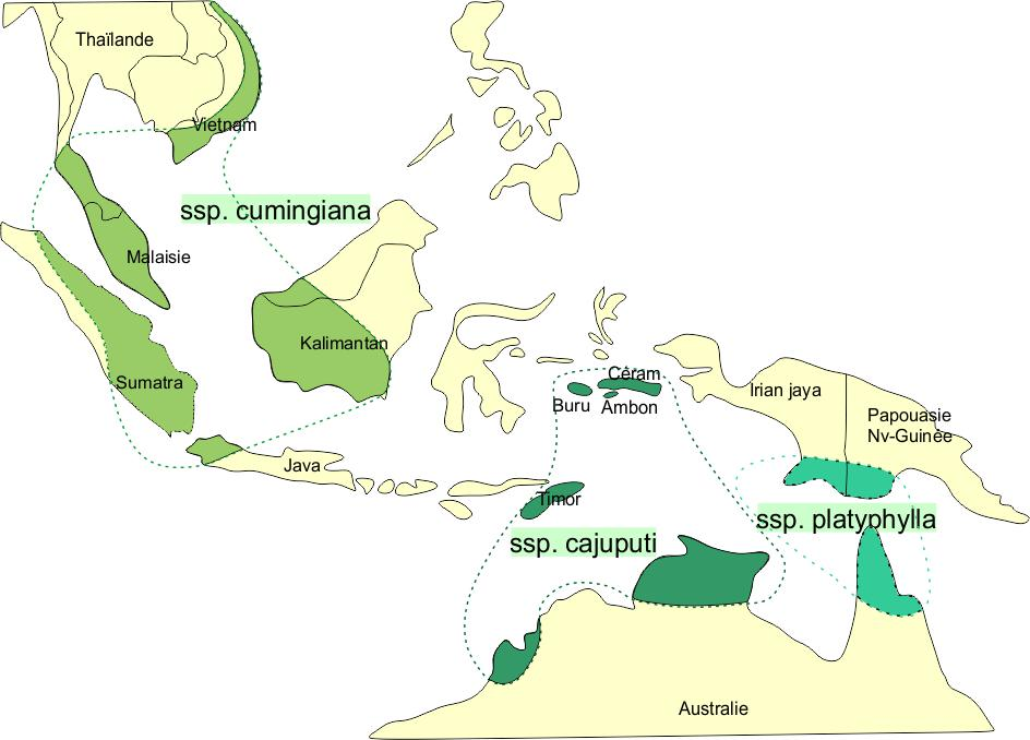 Distribution des 3 sous-espèces de Melaleuca cajuputi, tirée des cartes de Craven dans Ian Southwell, Robert Lowe, Tea Tree : The Genus Melaleuca, CRC Press, 2003